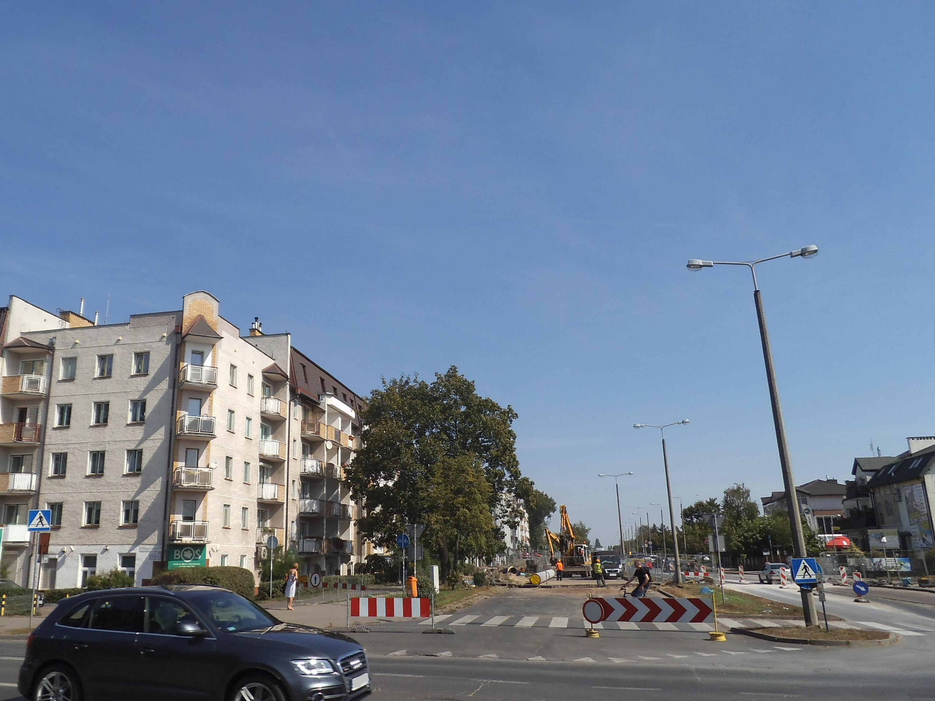 Ulica Długa w Toruniu